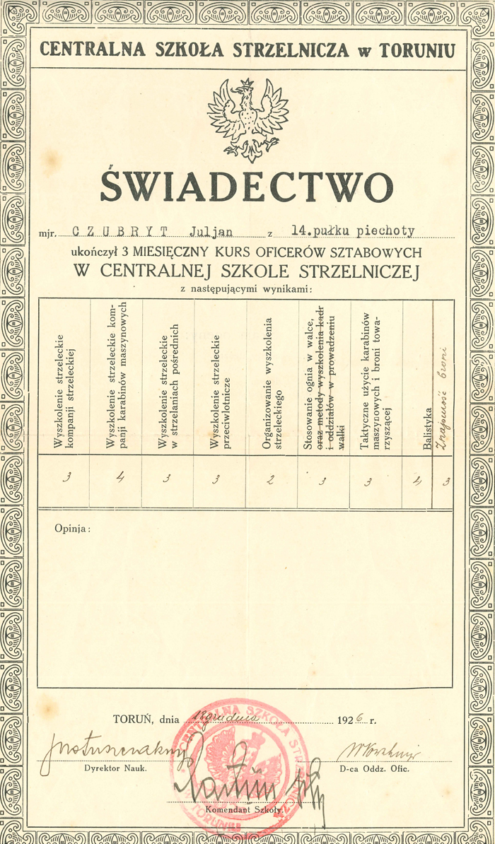 Świadectwo ukończenia kursu w Centralnej Szkole Strzelniczej